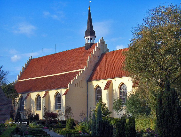 fra sydøst